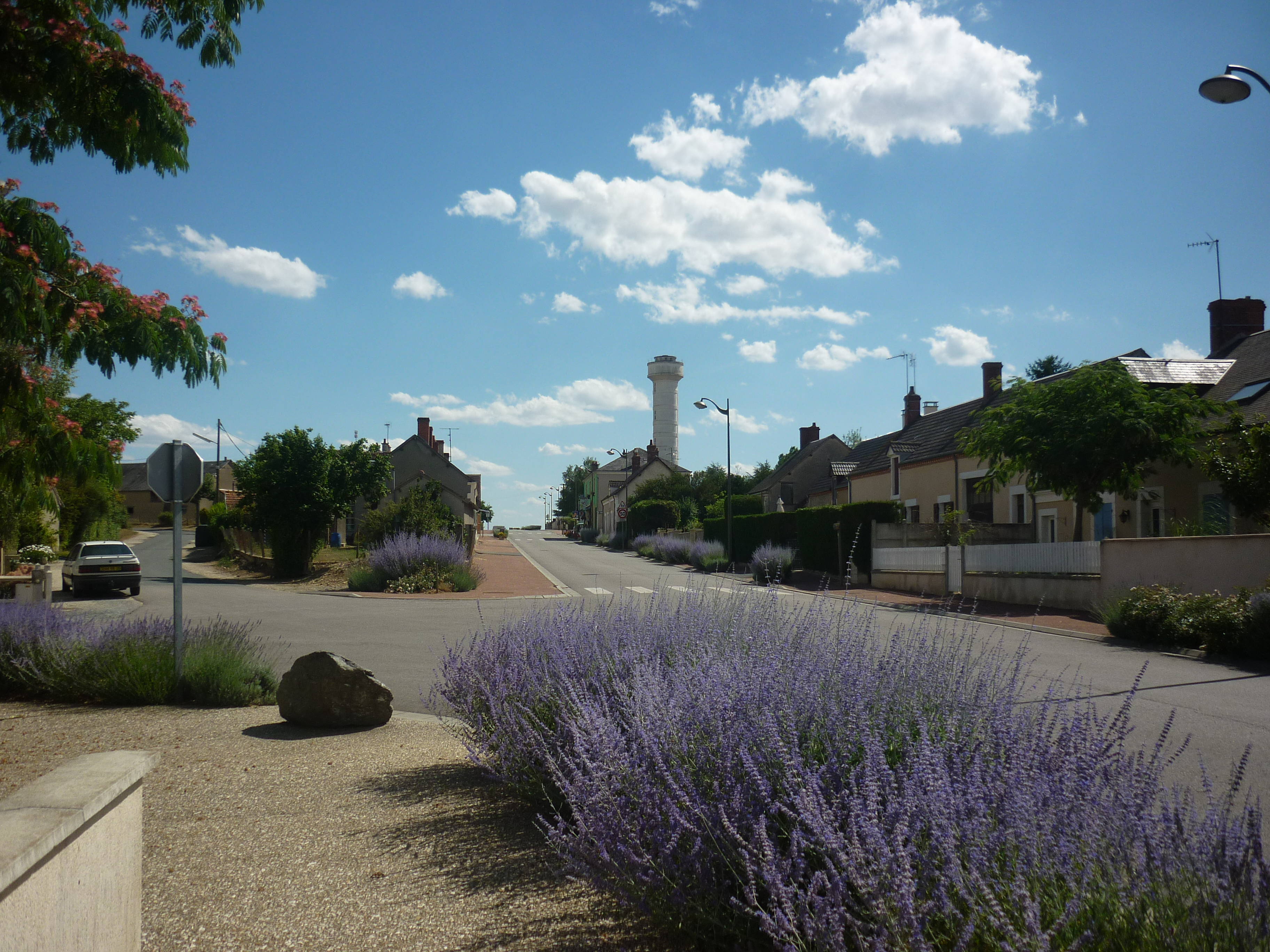 Vue de Chézelles (Indre, France).